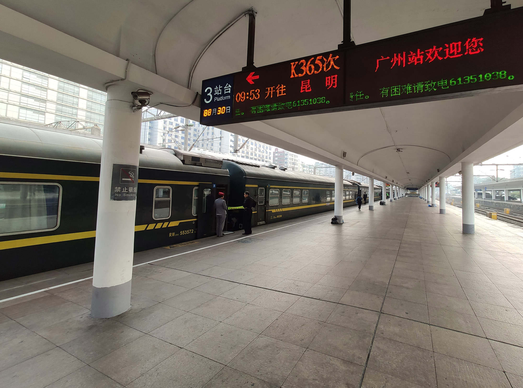 中文（中国大陆）: K365次列车停靠广州站3站台